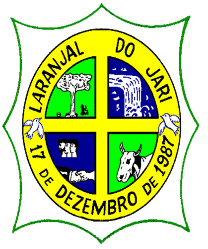 simbolo de Laranjal do Jari: brasao